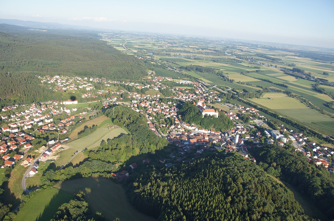 Luftbild Wörth an der Donau 2011